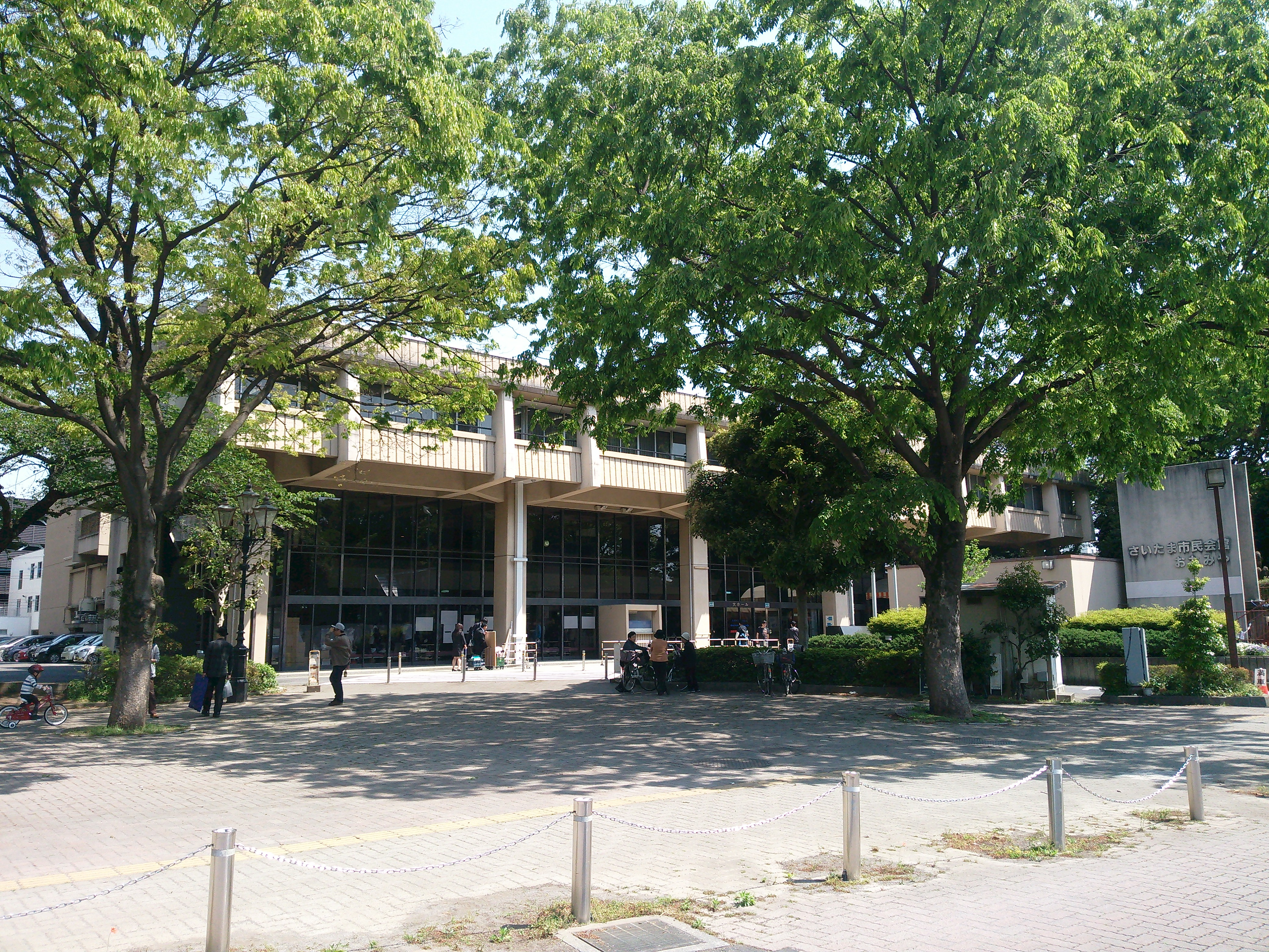 さいたま市大宮区、さいたま市民会館おおみや